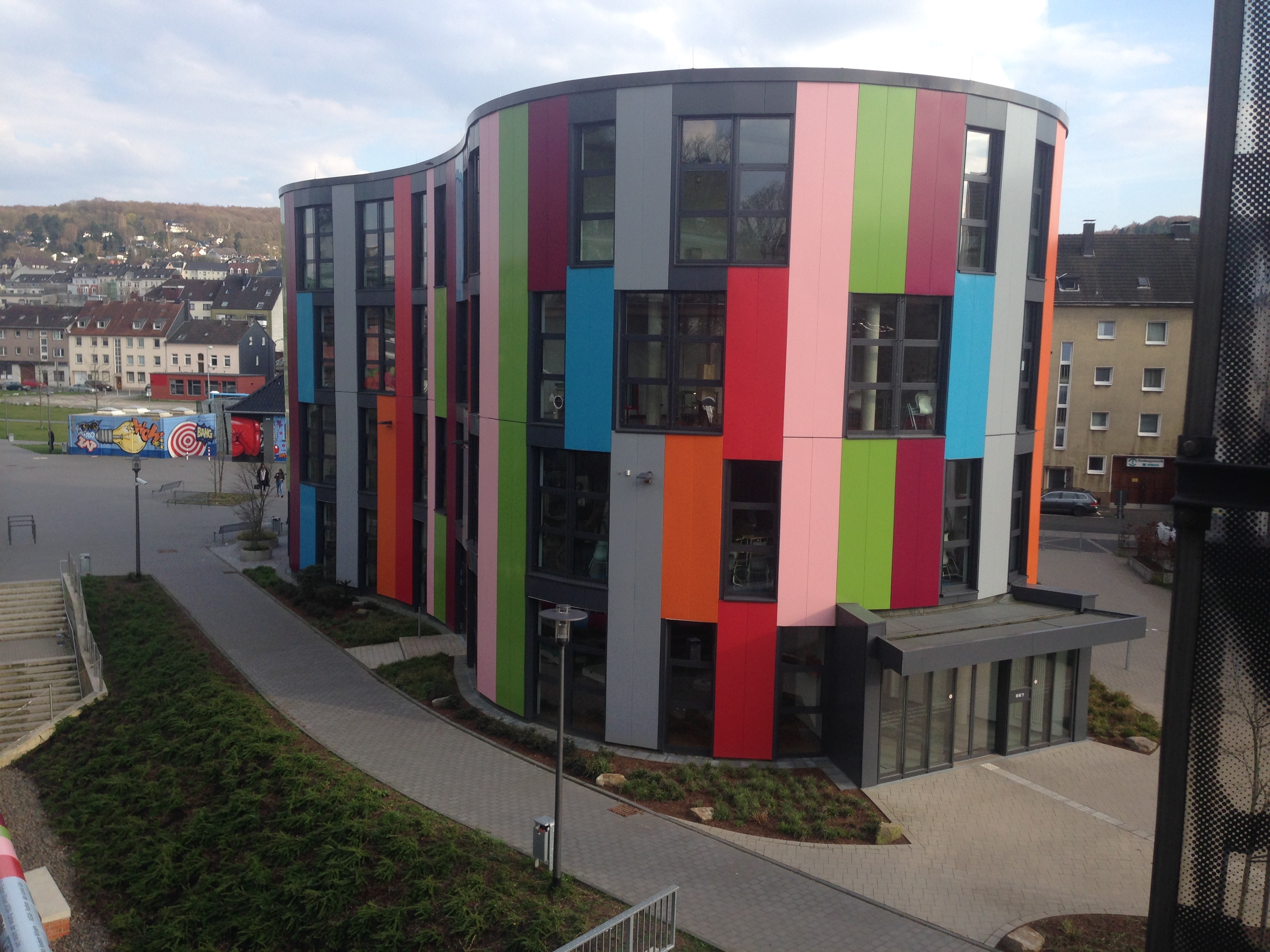 Das Gebäude der Junior-Uni Wuppertal.